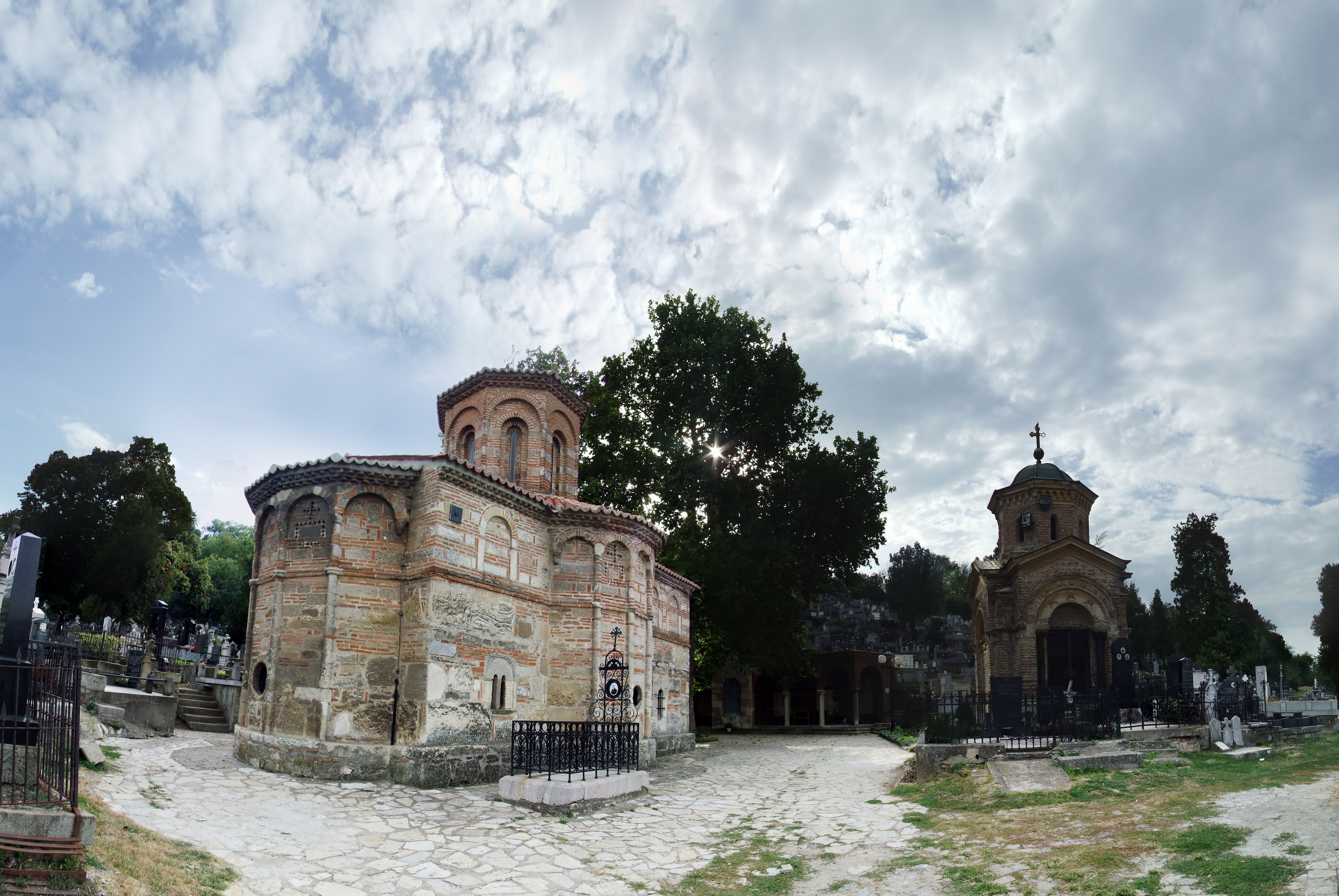 Stara crkva Uspenja Bogorodičinog na Starom smederevskom groblju.